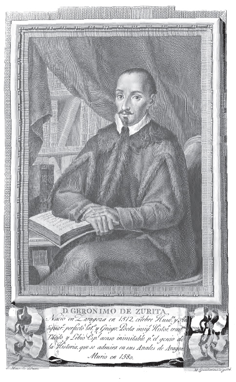 Retrato de Jerónimo Zurita (1512-1580)